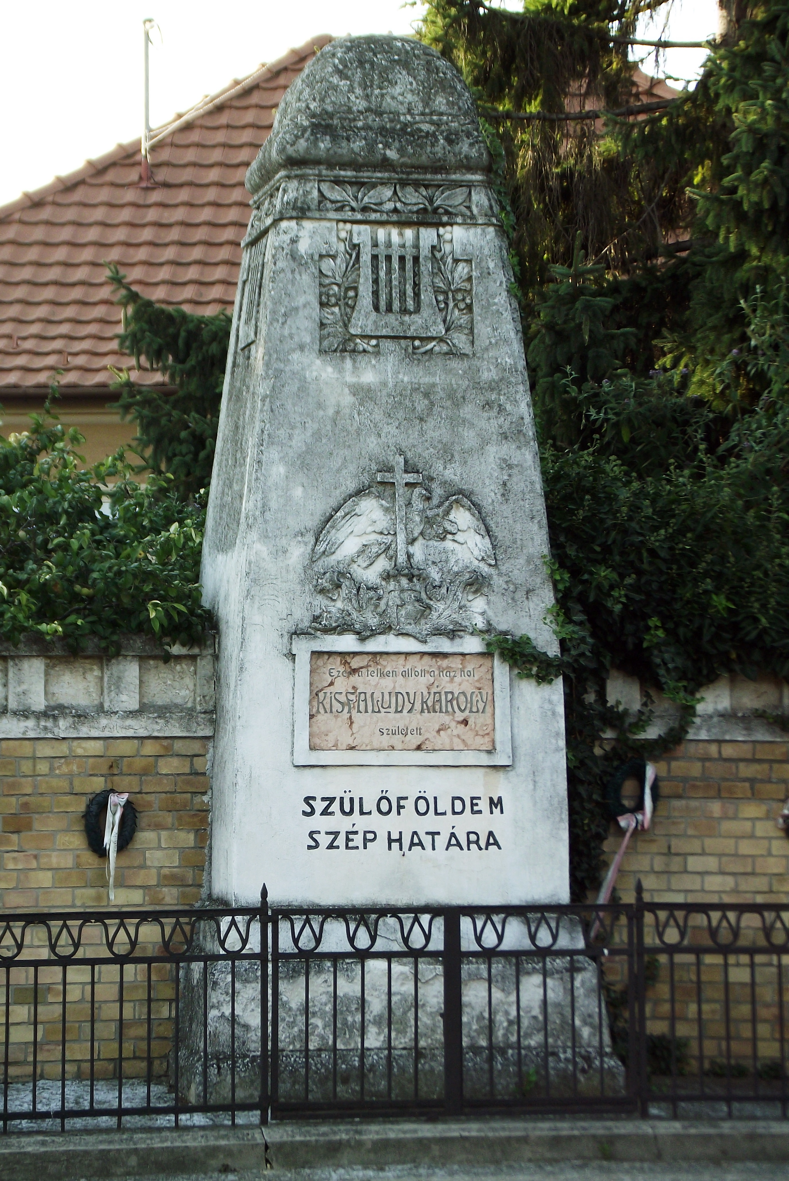 Kisfaludy emlékmű Tét városában, az egykori szülőház előtt.